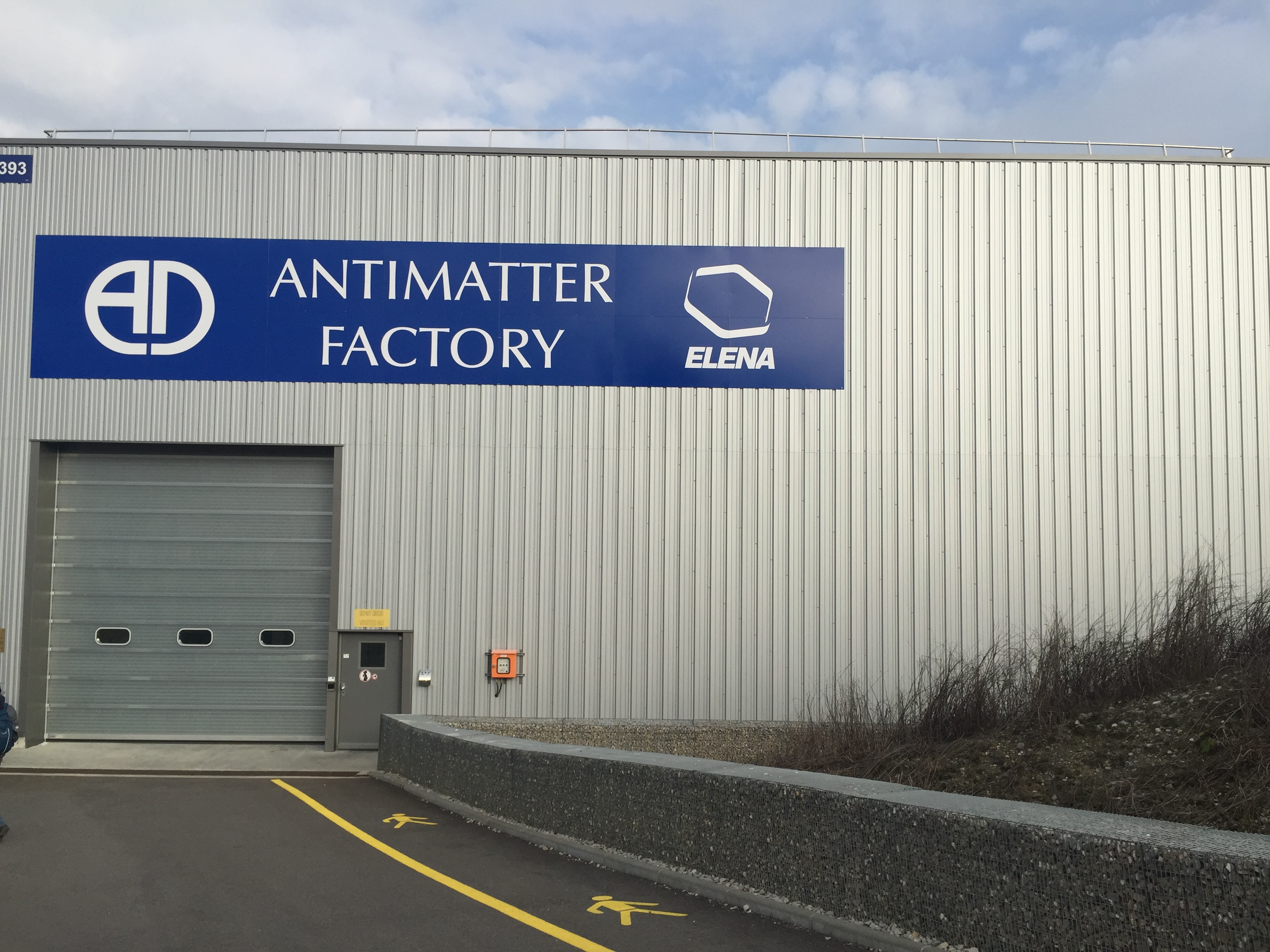 מפעל אנטי חומר בסרן